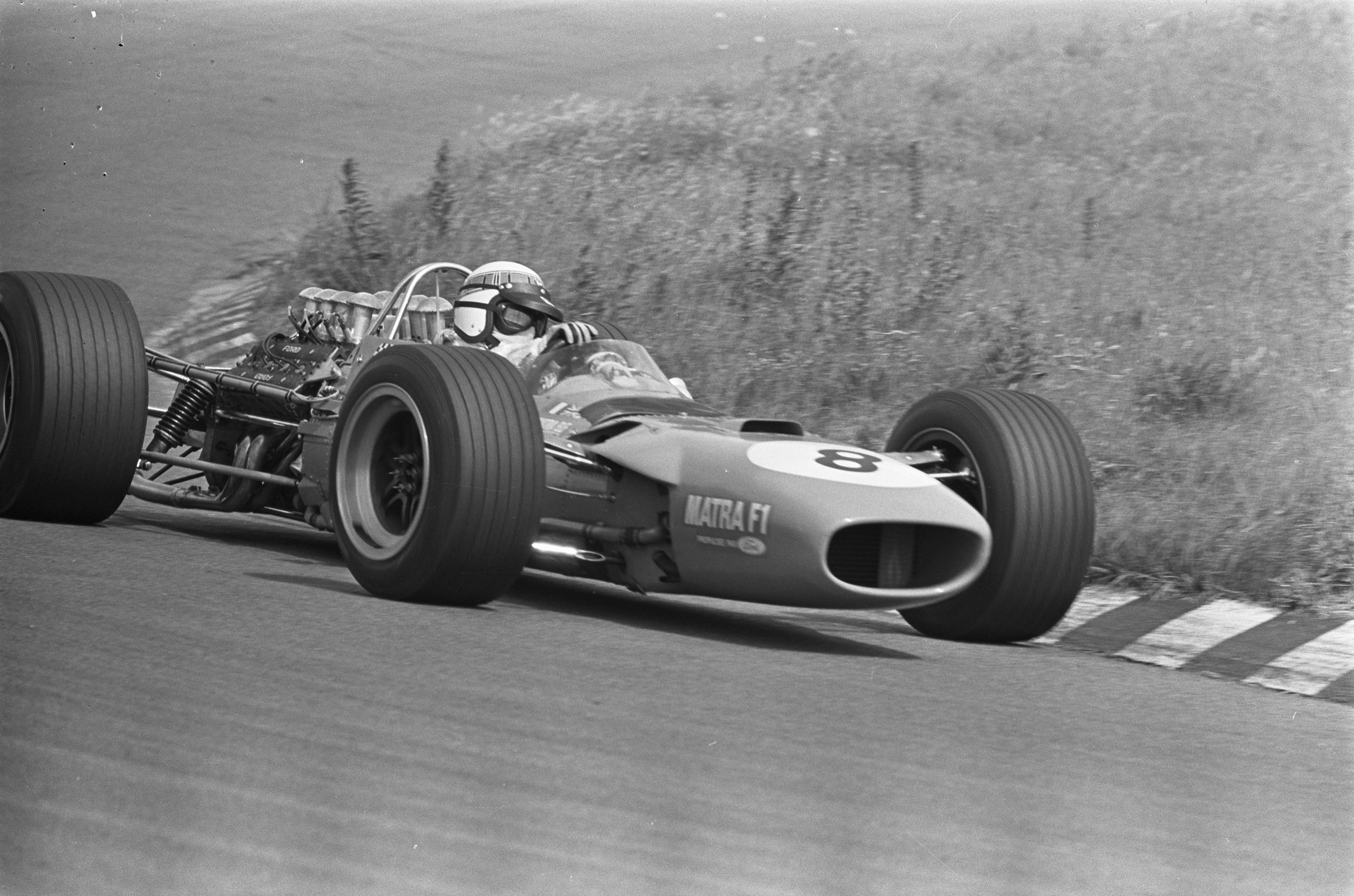 Grand Prix 68 Zandvoort . Nummers 15.17 Jackie Stewart , nummer 16 Dennis Hulme.